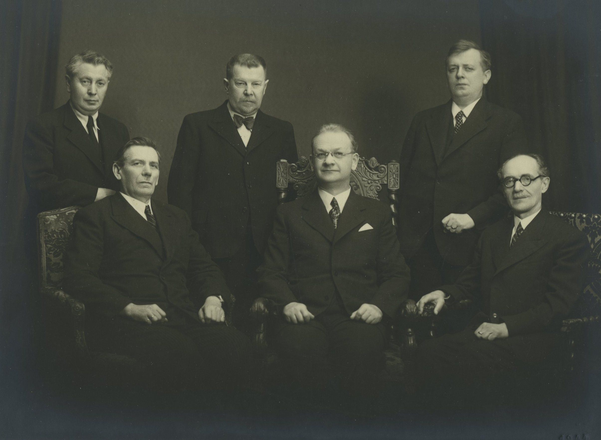 Synodní rada zvolená na mimořádném synodu 7.-8.12.1939. Sedící zleva synodní kurátor dr. Antonín Boháč, synodní senior Josef Křenek, náměstek synodního seniora Bedřich Jerie. Stojící zleva duchovenský člen SR farář Karel Machotka, JUDr. Josef Král, PhDr. Jindřich Hrozný